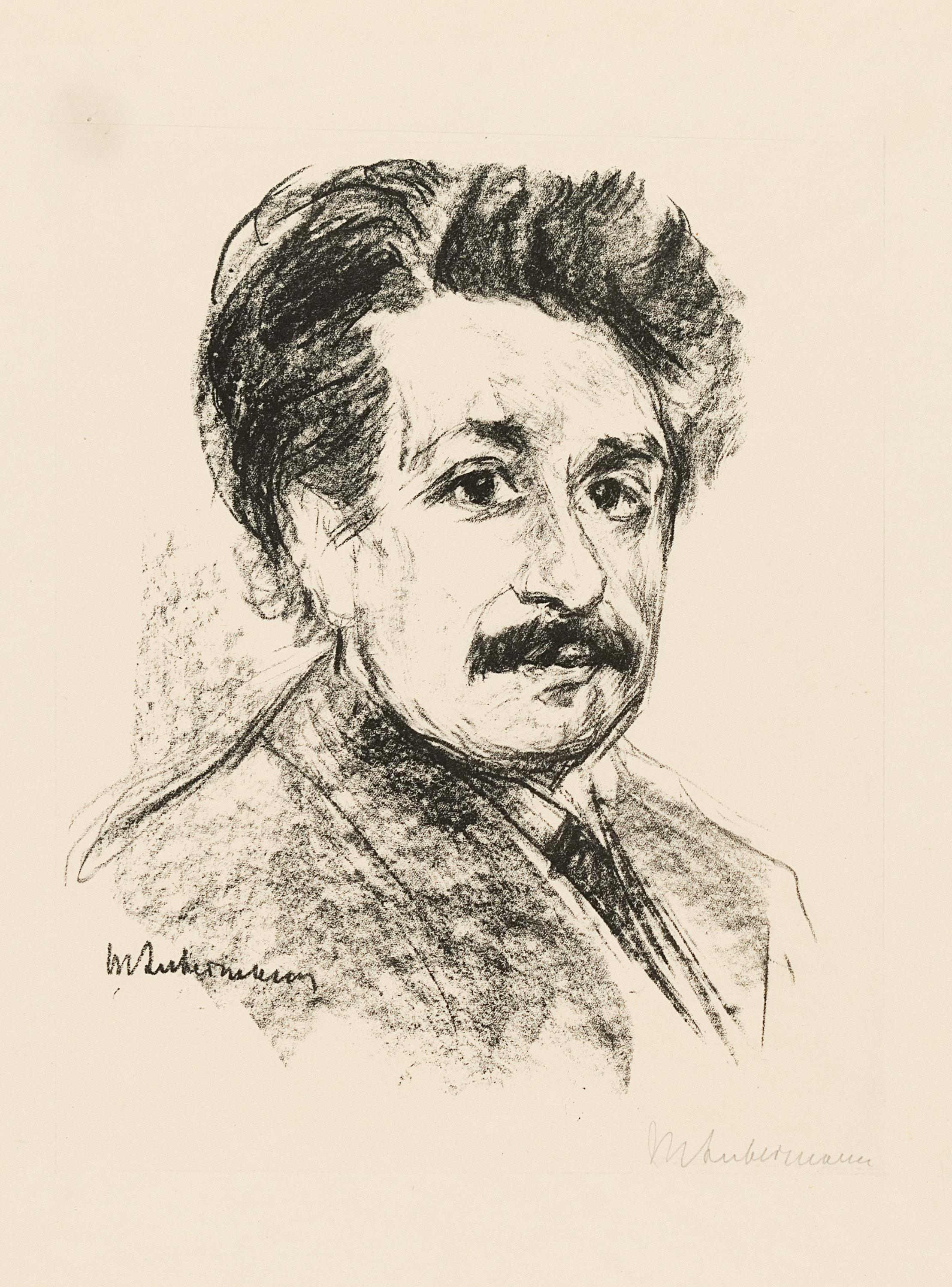 Portrait Albert Einstein. Lithographie auf Velin. 29,3 x 23,7 cm (48,3 x 32,5 cm). Signiert.